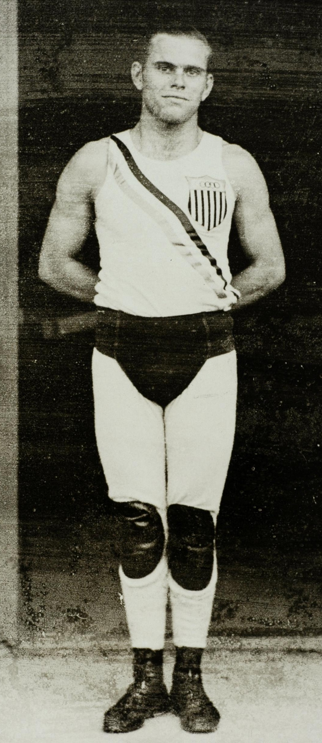 Sport. Sport, Olympische Spelen Amsterdam, 1928 : Allie Morrison, olympisch kampioen worstelen vrije stijl tot 61 kg